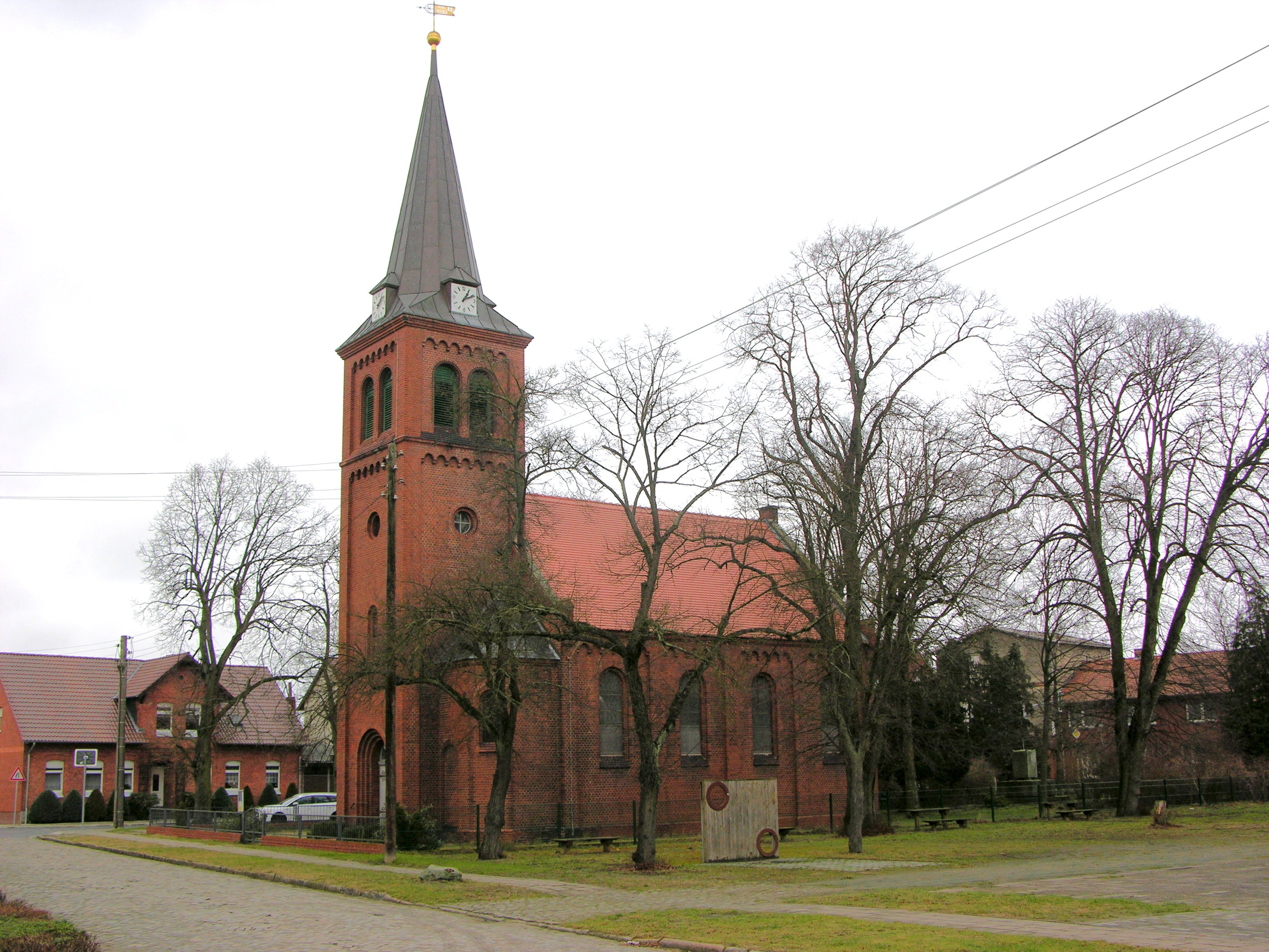 Kirche in Kunrau (Altmark)